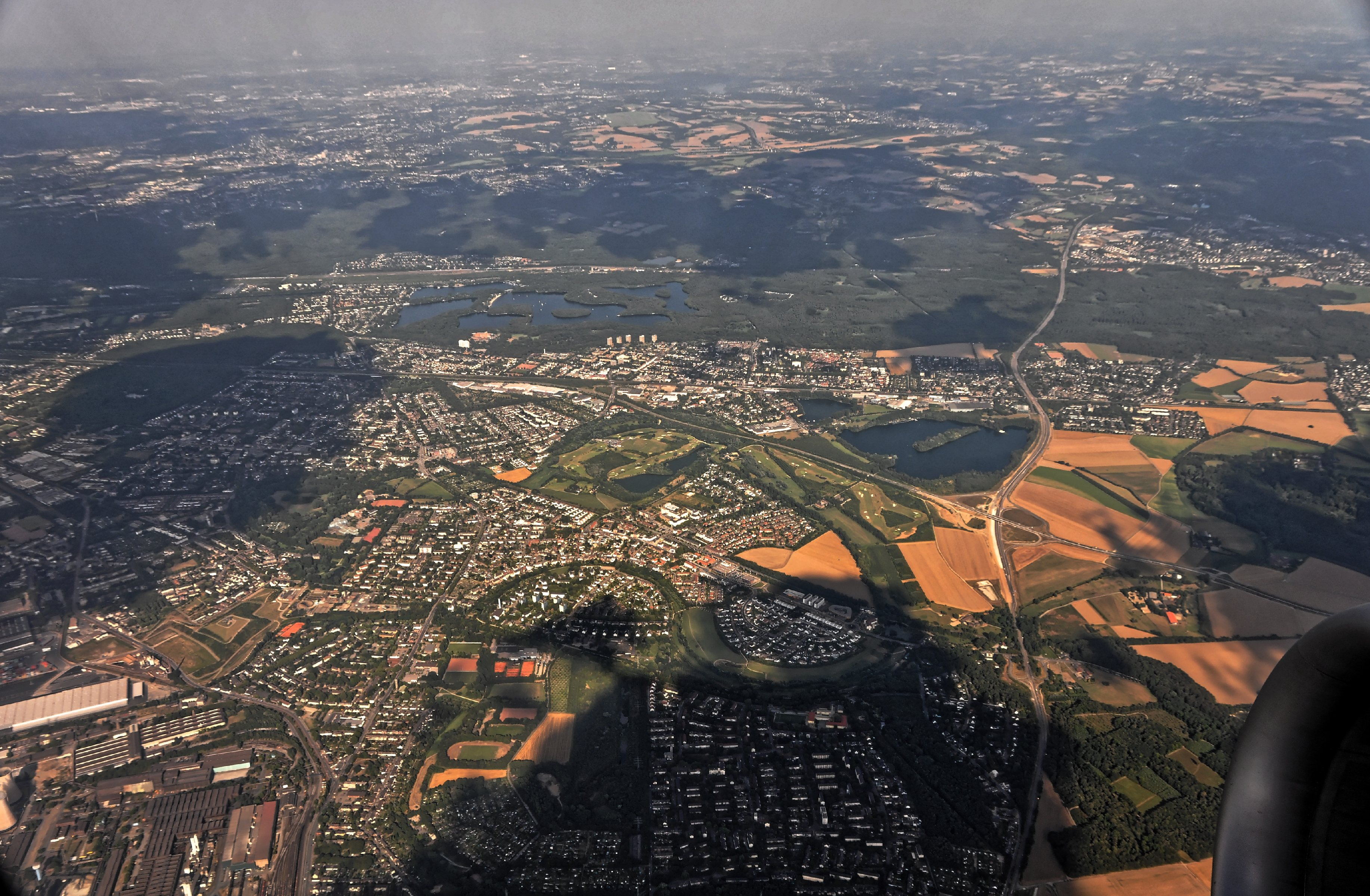 Bilder vom Flug -Rom-Düsseldorf-Hamburg 2013 Dieses Foto entstand in Zusammenarbeit mit Stadtbesichtigungen.de Die Seiten Stadtbesichtigungen.de, der dazugehörige Reise Blog sowie die Facebookseite: Stadtbesichtigungen Rom dürfen dieses Bild für Ihre Veröffentlichungen ohne den Hinweis auf Wikipedia, Commons bzw der Lizenz verwenden. Die Verantwortlichen habe von mir (Ra Boe) die Originaldaten zur freien Verfügung übermittelt bekommen.